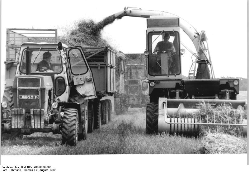 LPG Cobbelsdorf, Futterernte ADN-ZB Lehmann 9.8.82 Bez.Halle-Bei hochsommerlichen Temperaturen bringen die Genossenschaftsbauern der LPG Cobbelsdorf das Futter ein. Damit werden drei LPG Tierproduktion versorgt. - siehe auch 1982-0809/4N